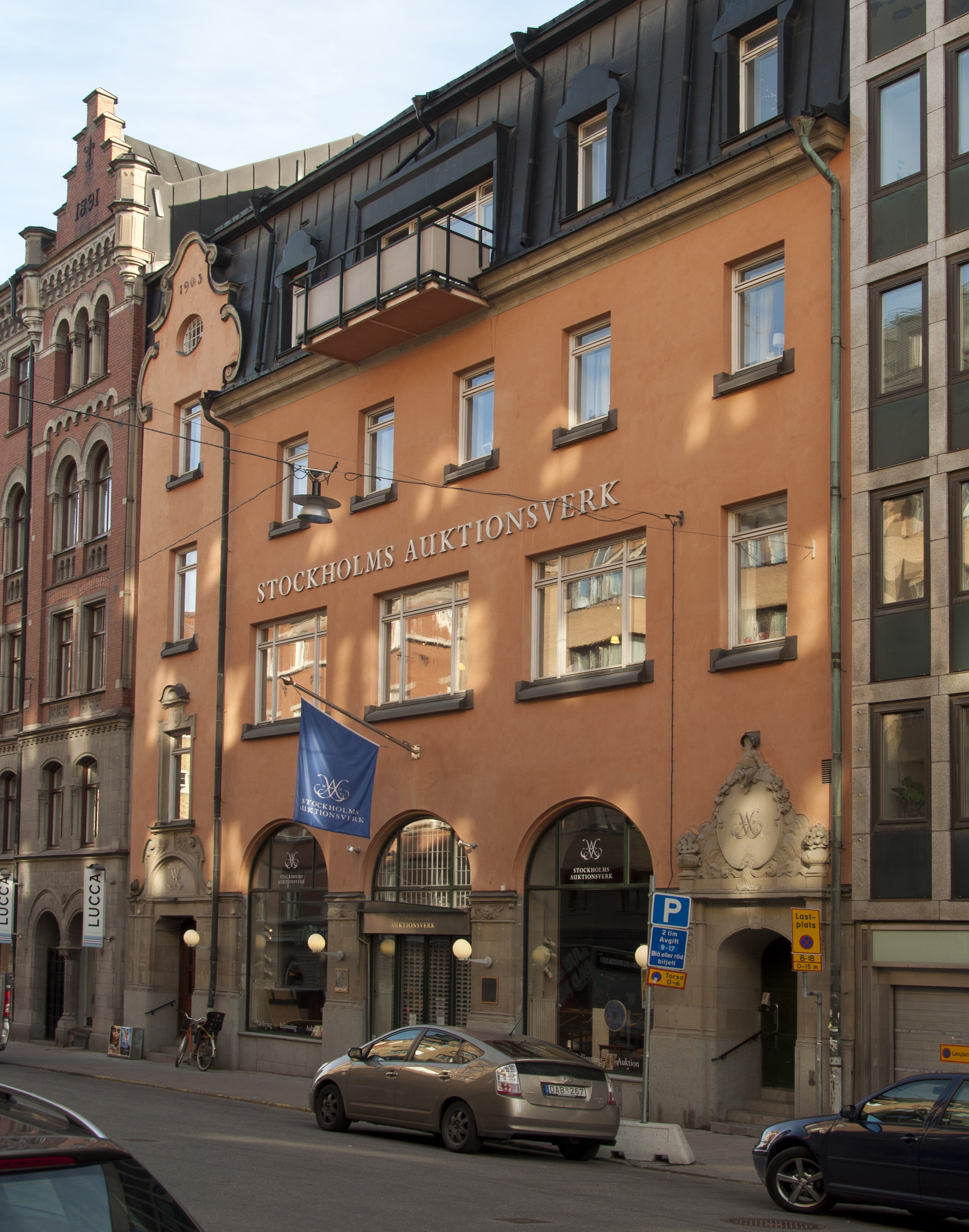 Stockholms auktionsverk, Nybrogatan 32, Östermalm. Ursprungligen Stockholms utskänkningsaktiebolag världshus. Arkitekt: Sam Kjellberg. Byggdes: 1902-1903.